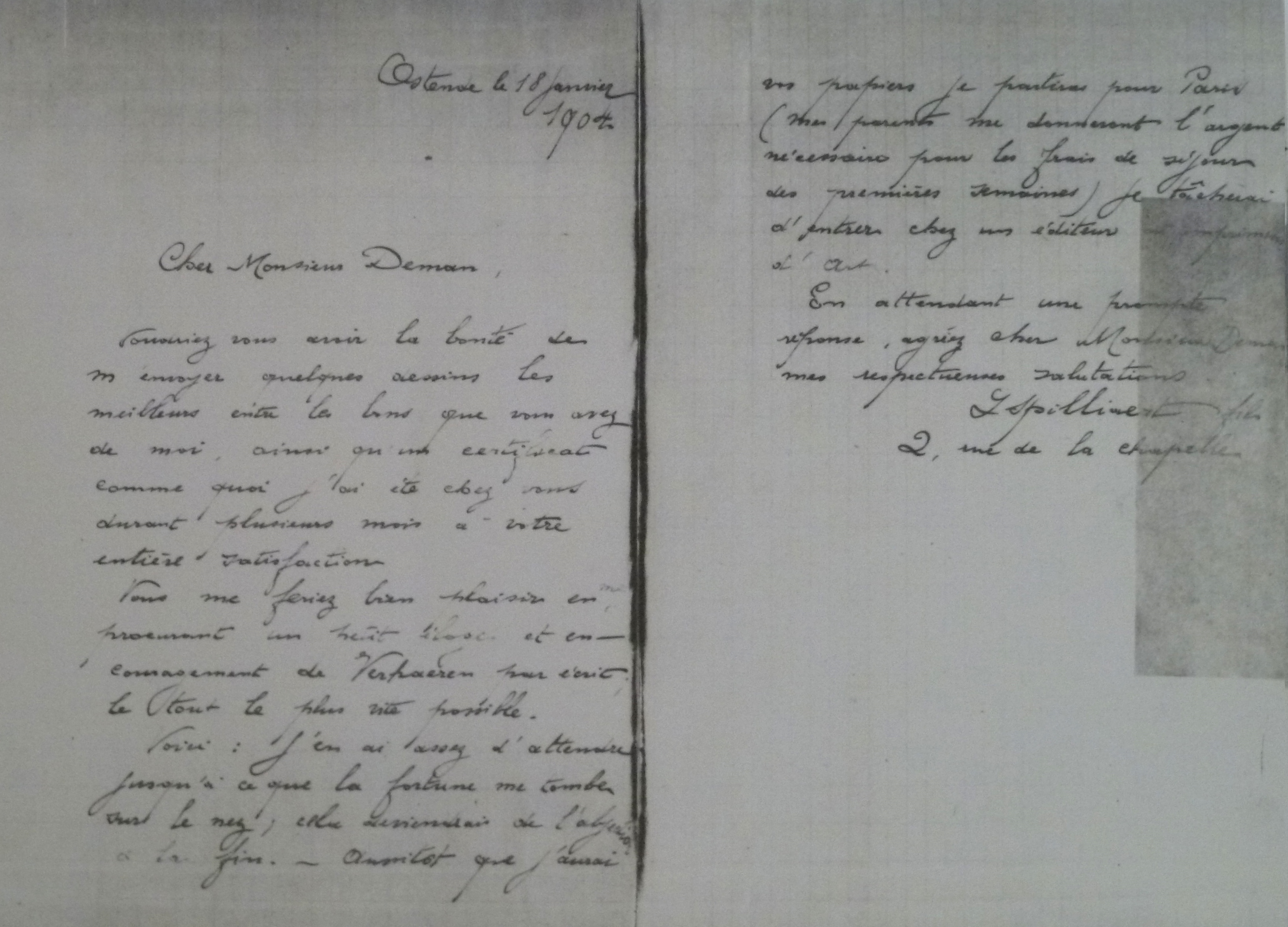 "Brief aan Edmond Deman" (18 januari 1904) door de Belgische kunstschilder Léon Spilliaert (1881-1946); privéverzameling